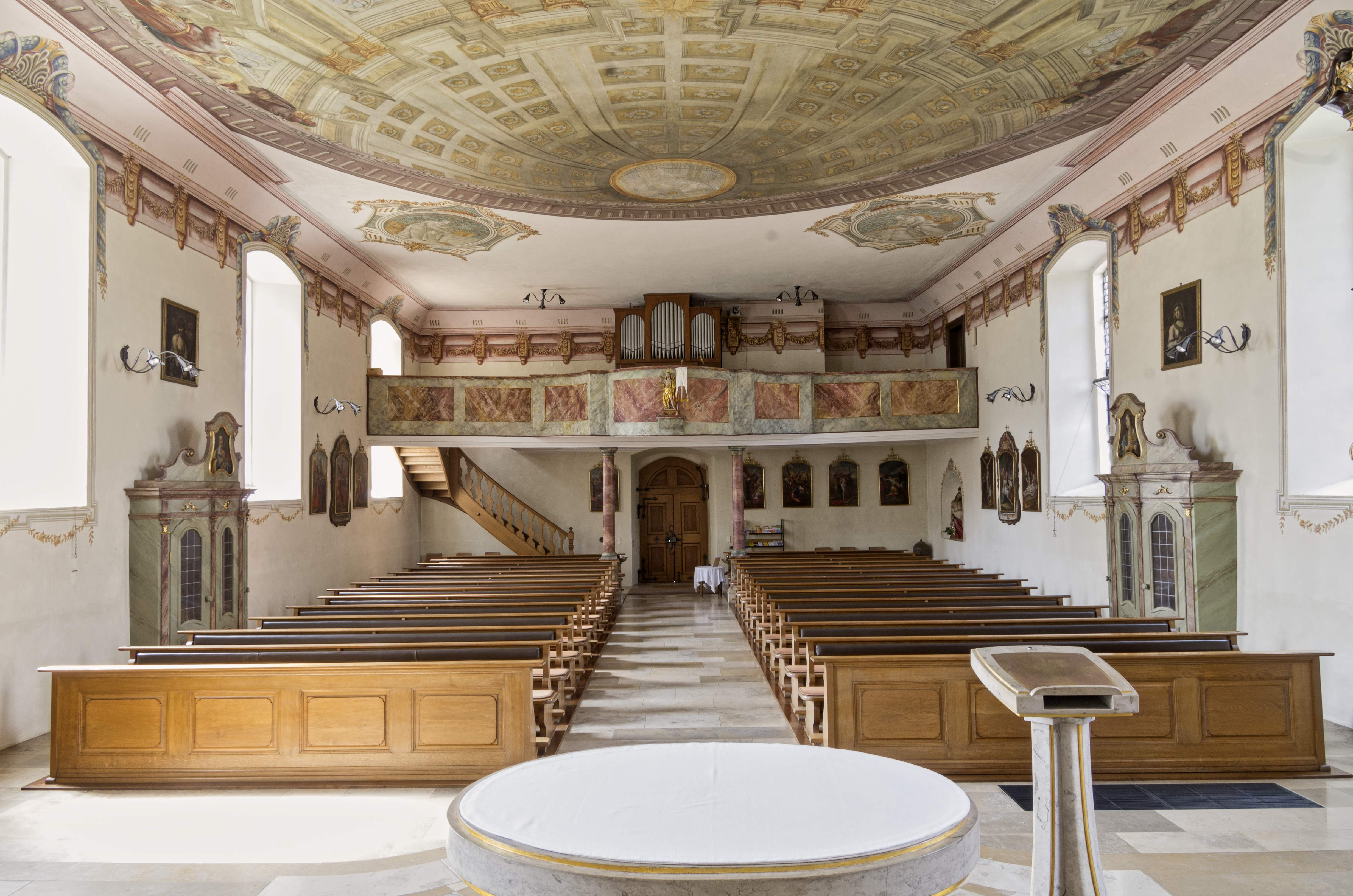 Katholische Pfarrkirche in Sölden bei Freiburg